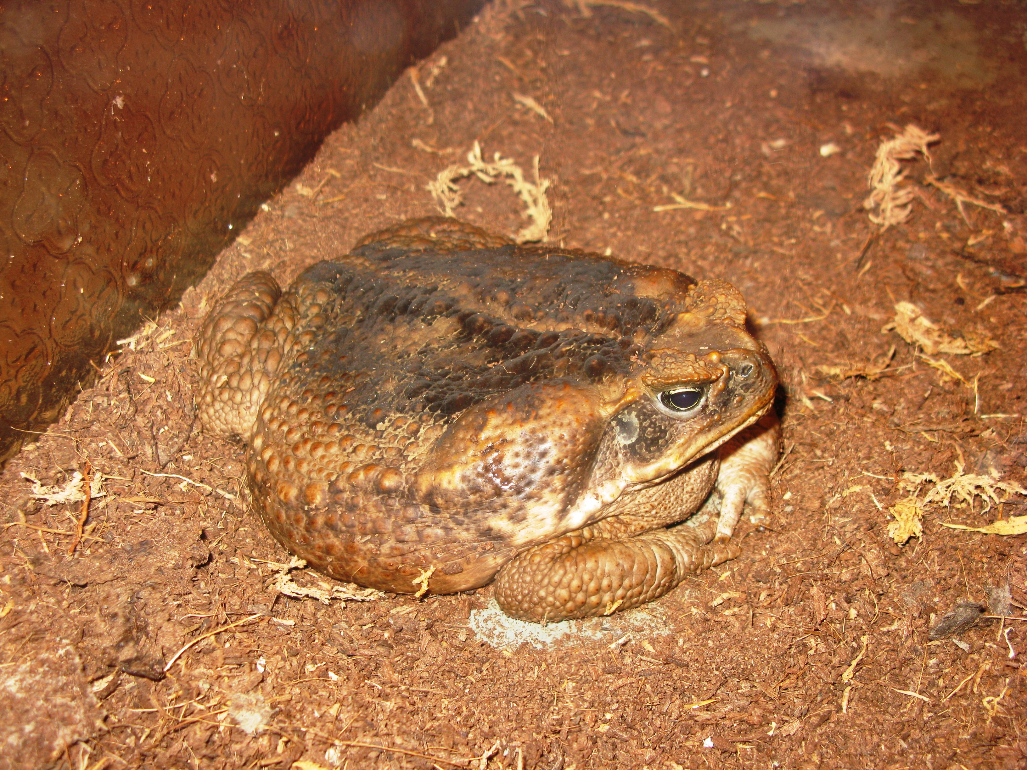 Жаба-ага (Bufo marinus) в зоопарке города Гродно, Беларусь.